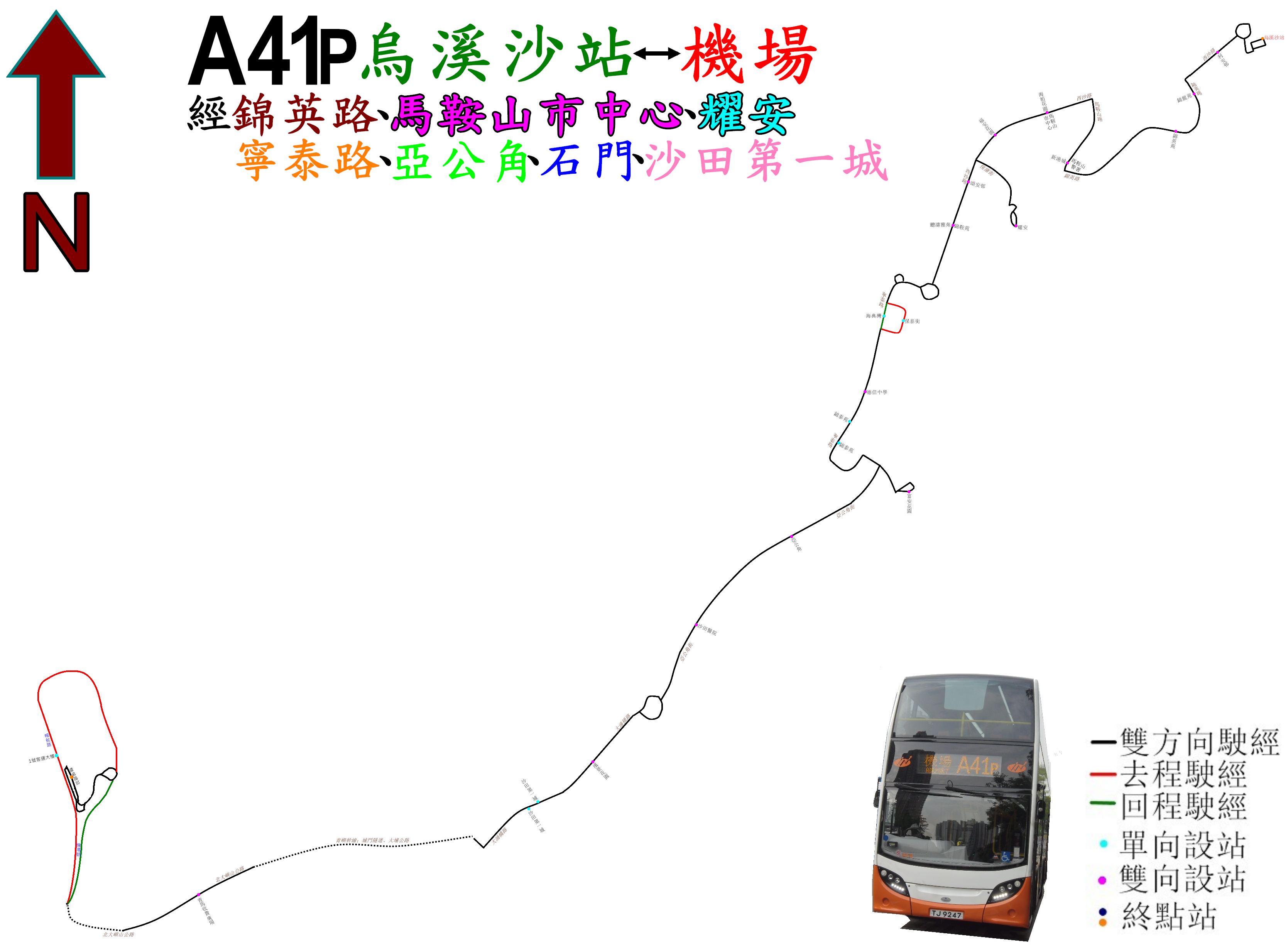 中文（香港）: 龍運巴士A41P的走線圖